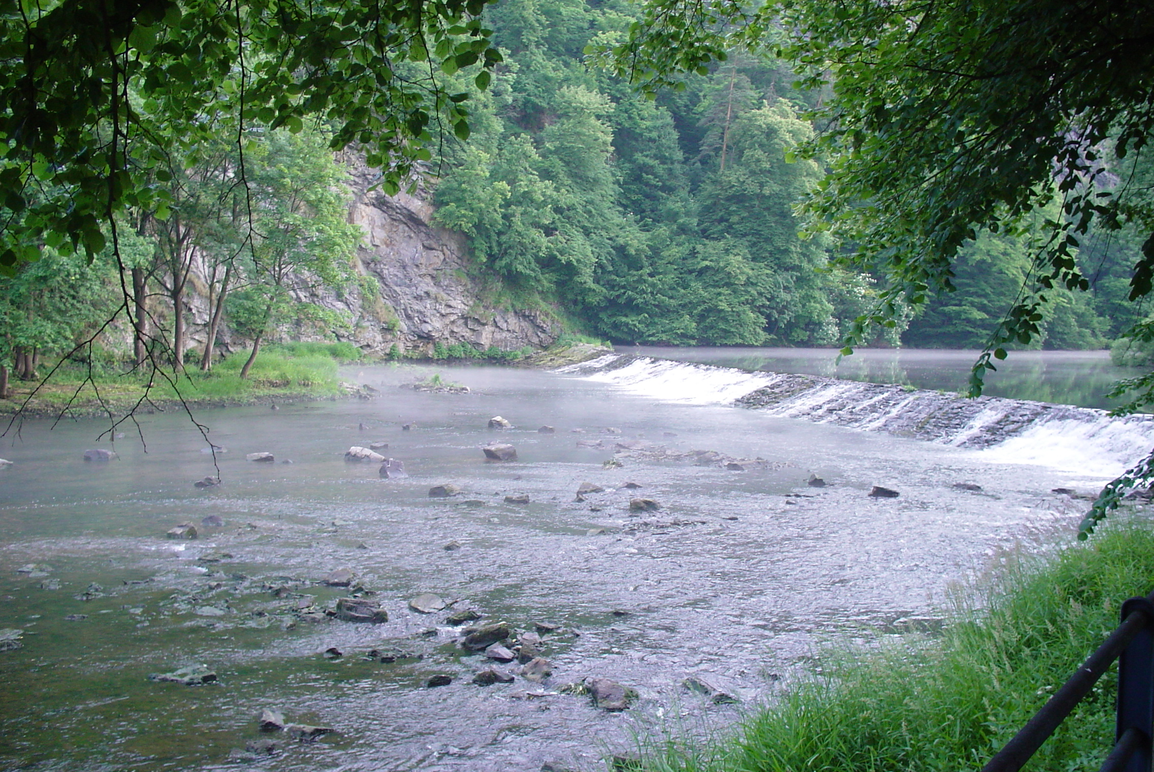 Jez (Vranov nad Dyjí), na řece Dyji, u mlýna v obci, Vranov nad Dyjí